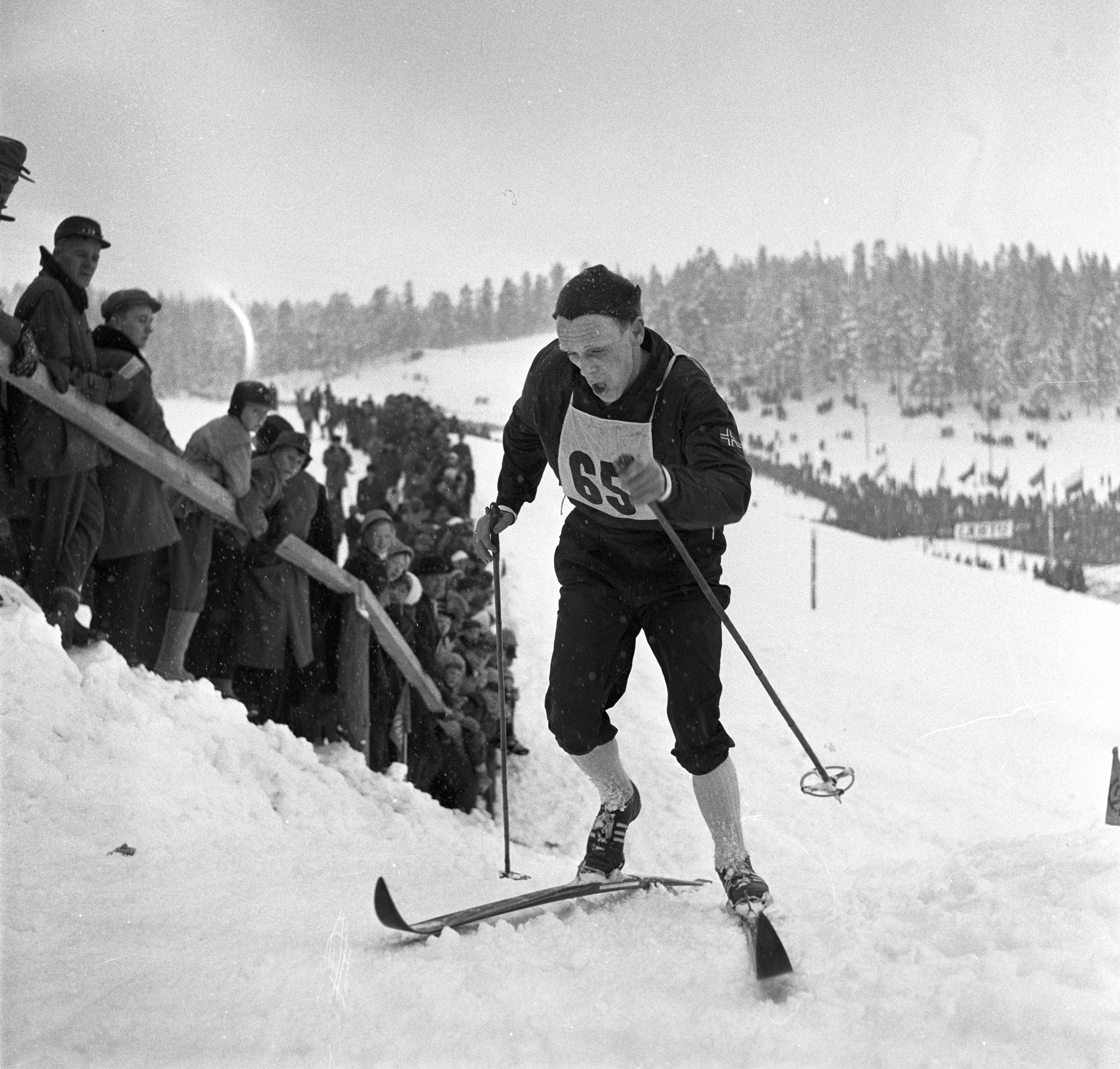 Håkon Brusveen in Lahti, Finland